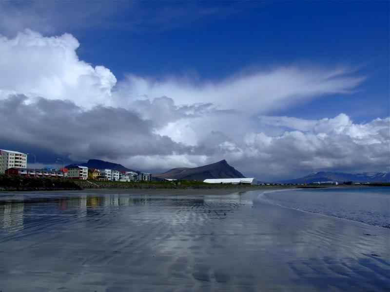 Langisandur in Akranes Iceland